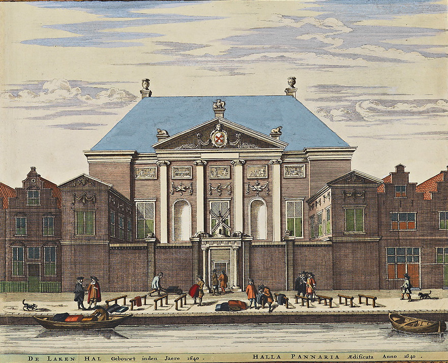 Lakenhal van Leiden uit het Stedenboek van Frederick de Wit.